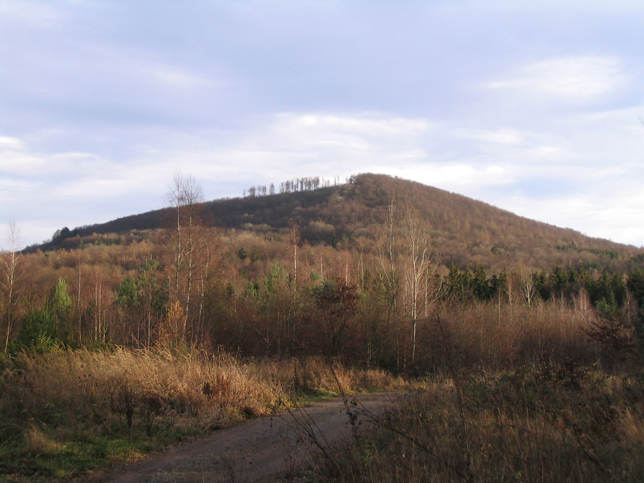 Blick zum Dreistelzberg in der Rhön beim Aufstieg von Wernarz, einem Ortsteil von Bad Brückenau im Landkreis Bad Kissingen